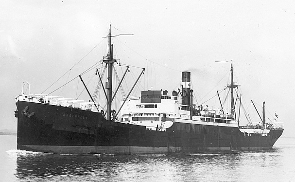 Die zweite ARGENFELS der DDG Hansa 1924, ursprünglich OCKENFELS